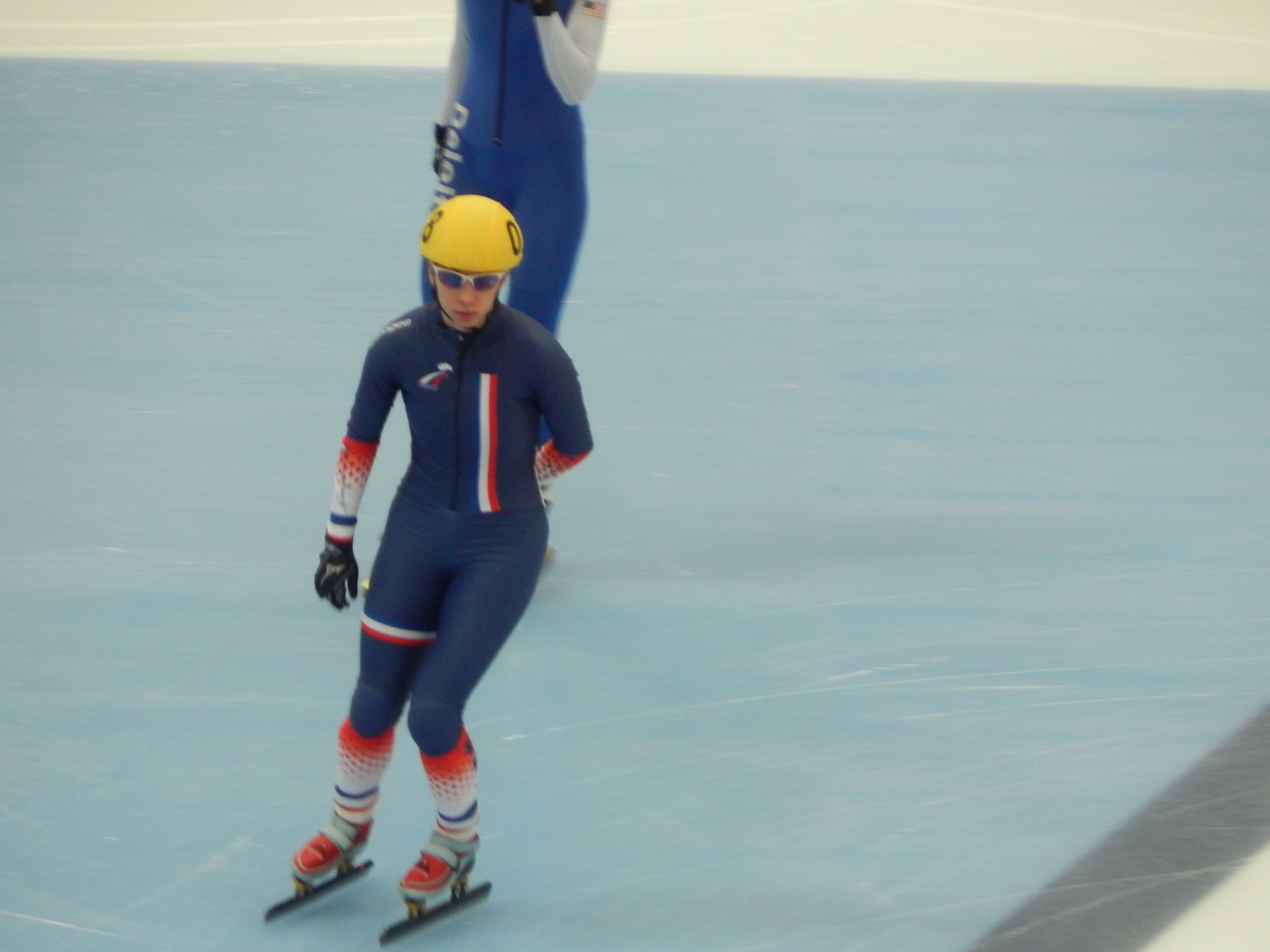 Чемпионат мира по шорт-треку 2015 в Москве Квалификационный раунд, 8 забег, 1000 м, Женщины